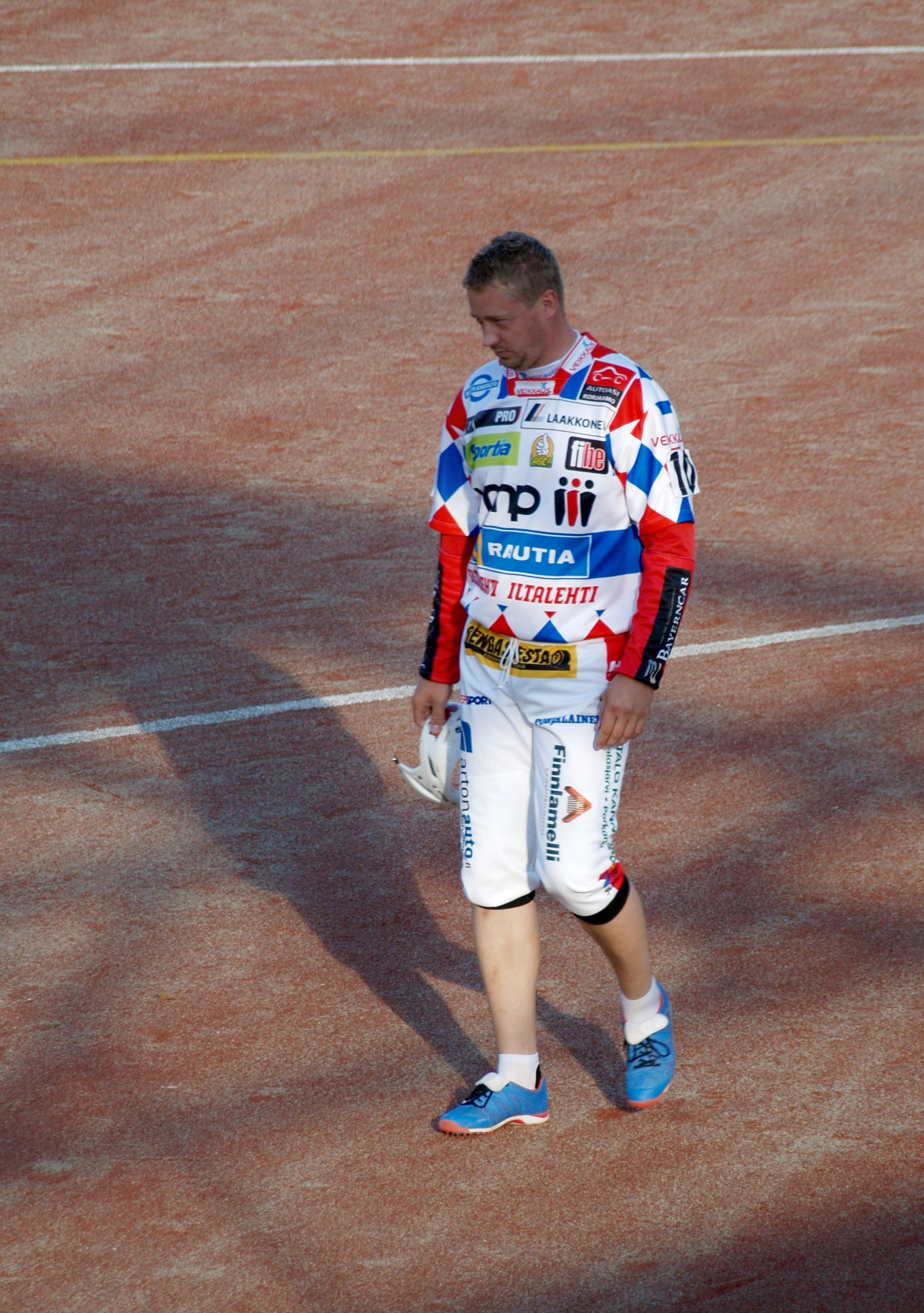 Vimpelin Veto - Koskenkorvan Urheilijat pesäpallo-ottelu 1.8.2014. Kuvassa Jere Dahlström.